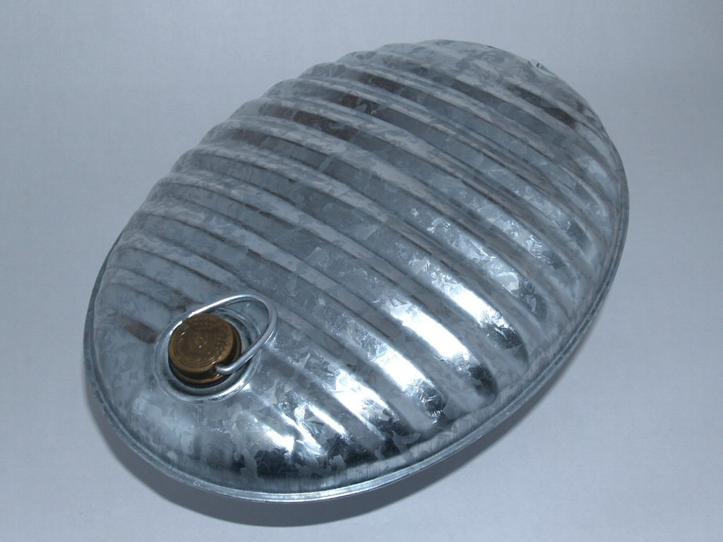 Wärmflasche